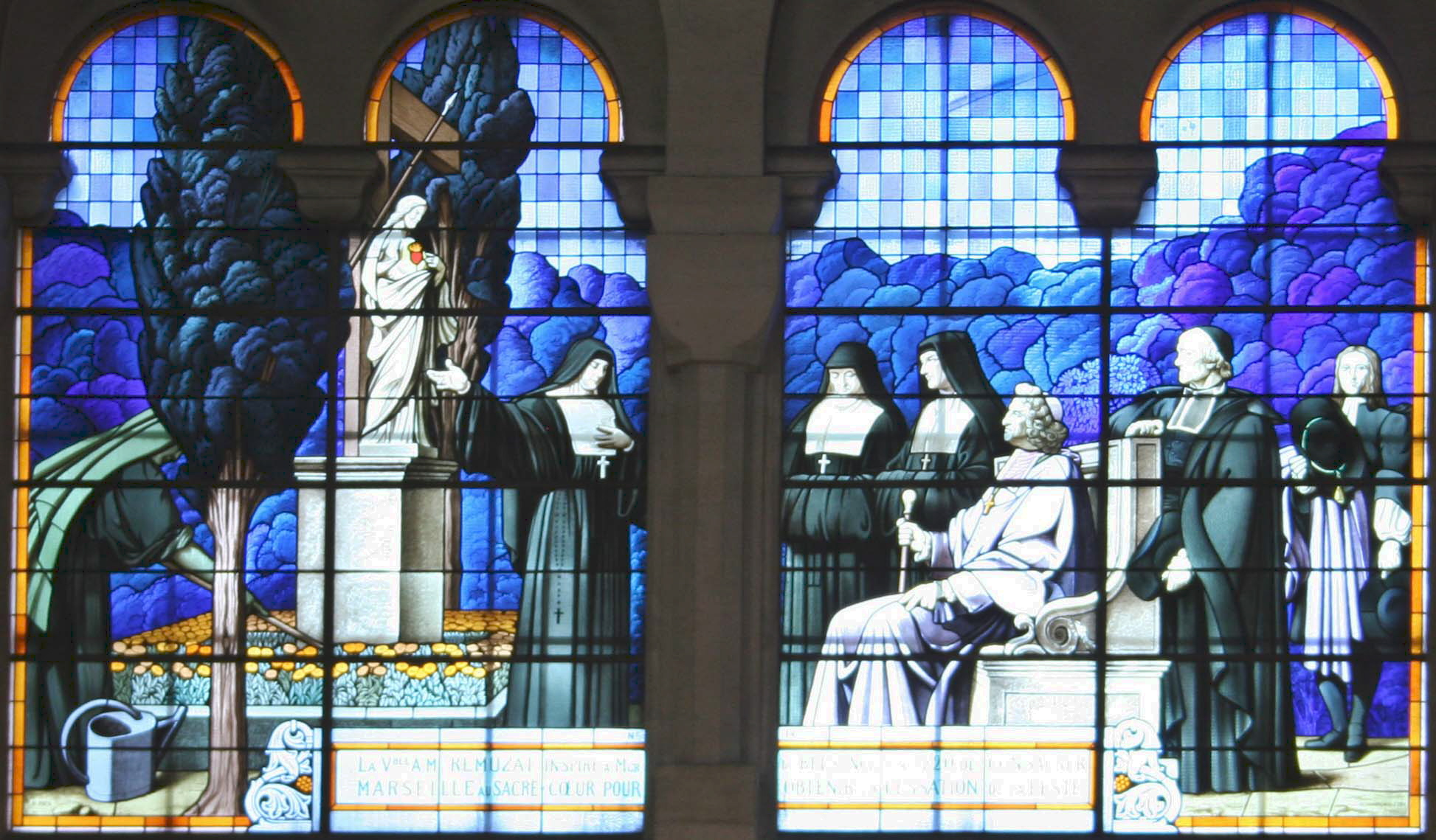 Vitrail de la basilique du Sacré-cœur à Marseille représentant l'évêque Mgr de Belsunce consacrant la ville de Marseille au Sacré-Coeur de Jésus (baie 14). Inscription : N° IV - La Vble A M Remuzat inspire à Mgr de Belsunce en 1720 de consacrer Marseille au Sacré-Coeur pour obtenir la cessation de la peste Signature : H Pinta.